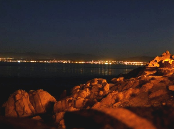 Coquimbo desde el fuerte (cropped)